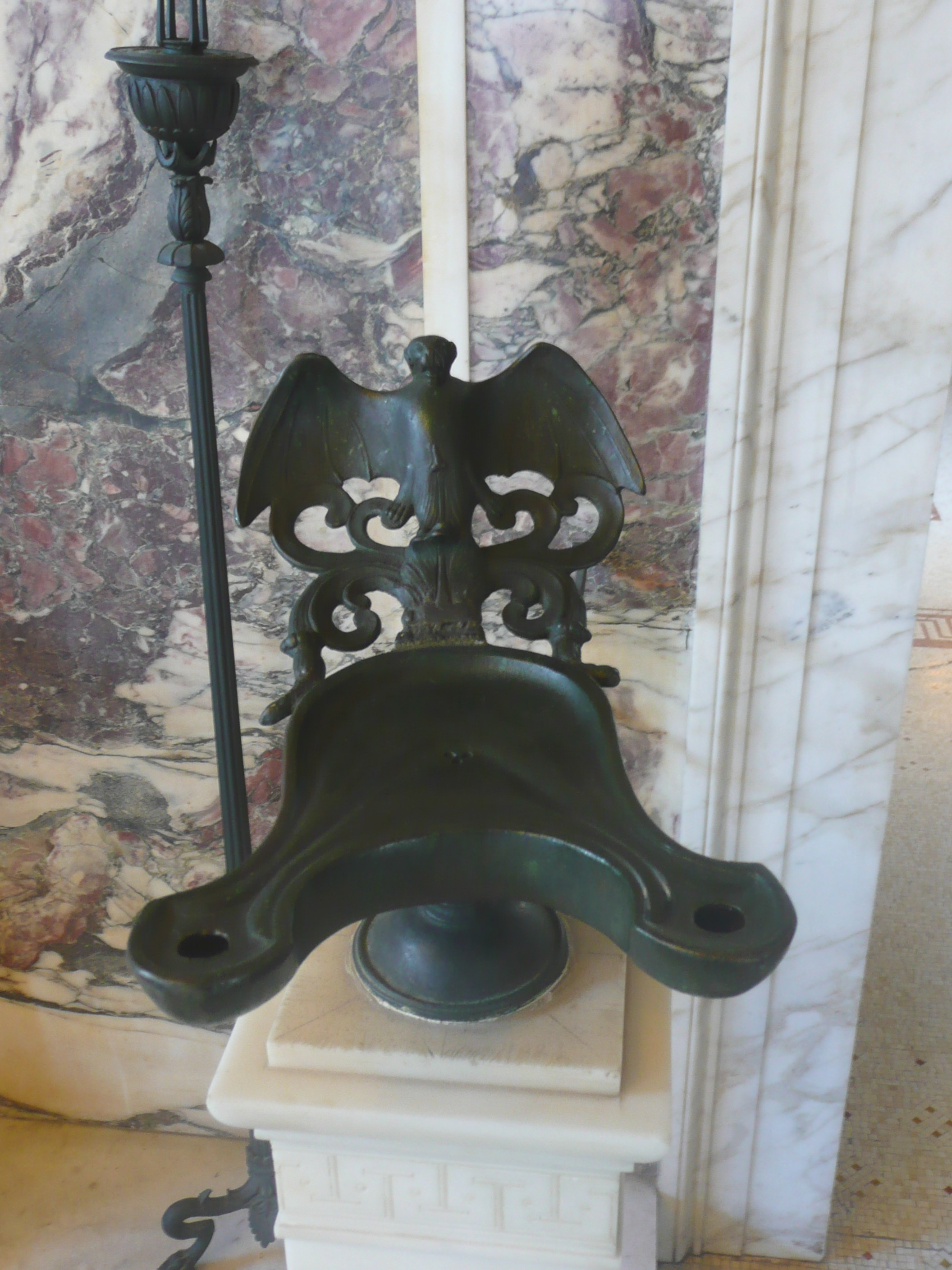 A Beaulieu-sur-Mer (Alpes-Maritimes, France), villa Kérylos, Andron (salon des hommes), grand salon, lampe à huile double en bronze.